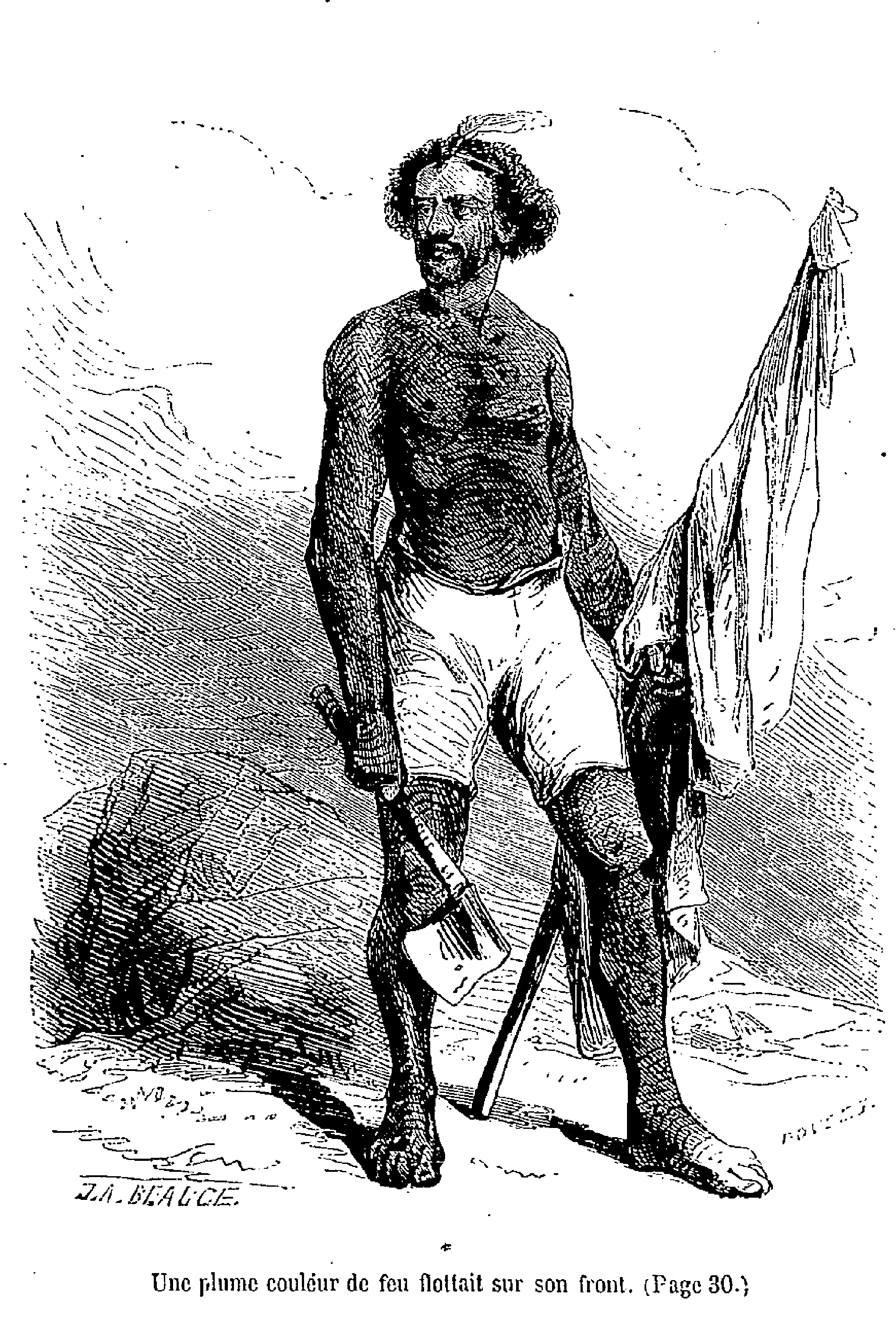 Illustrations for "Bug-Jargal" by Victor Hugo